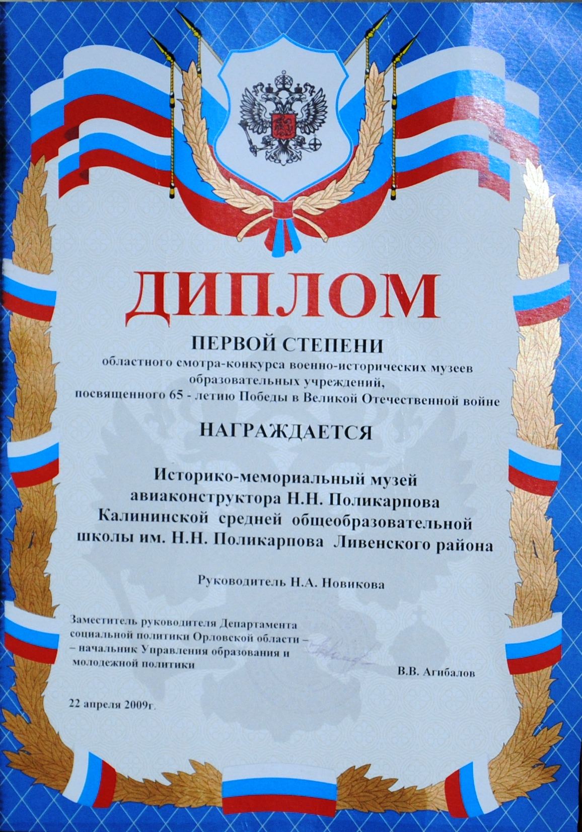 Eduardo Macêdo de Lima